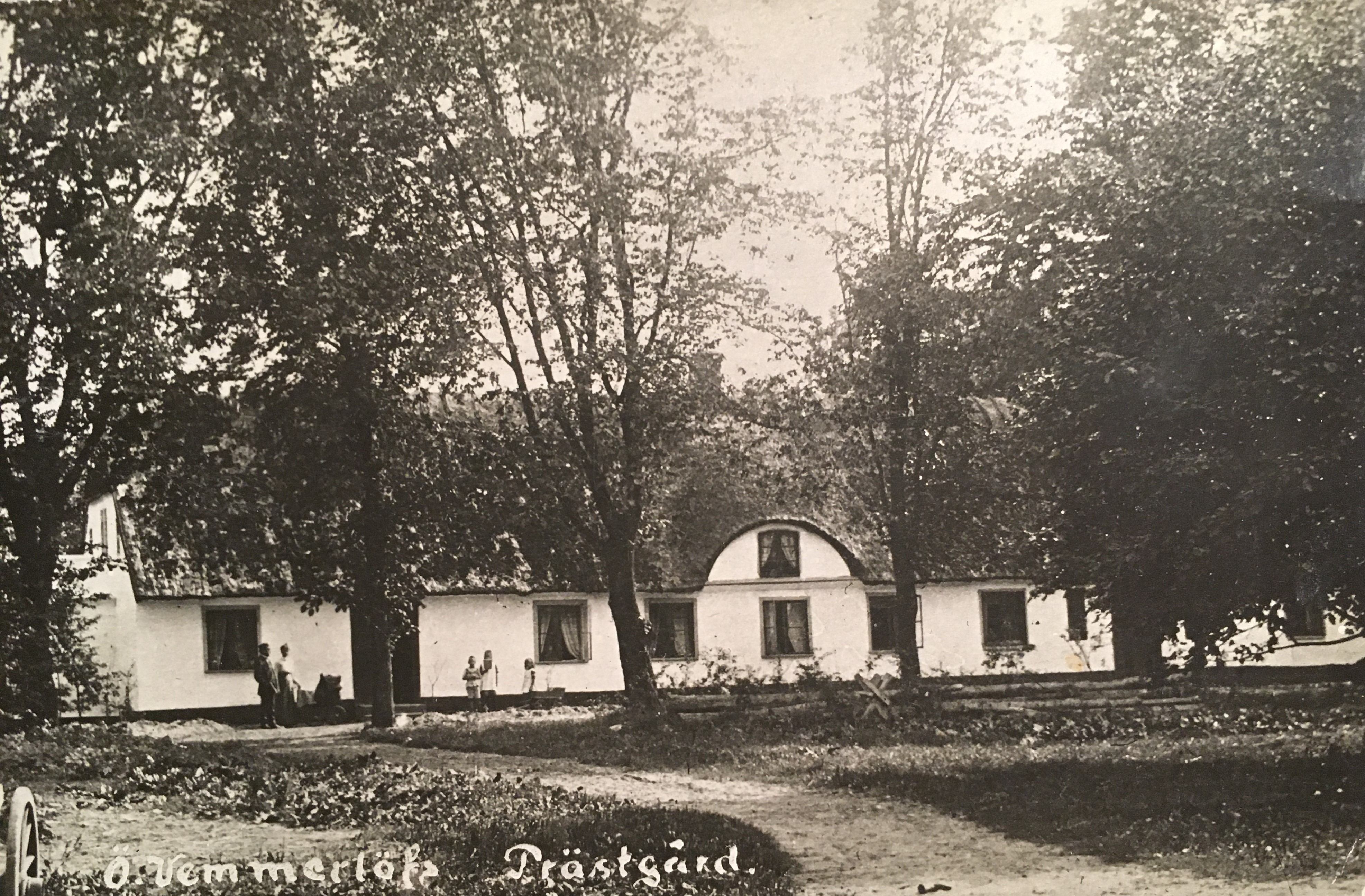 Östra Vemmerlövs gamla prästgård